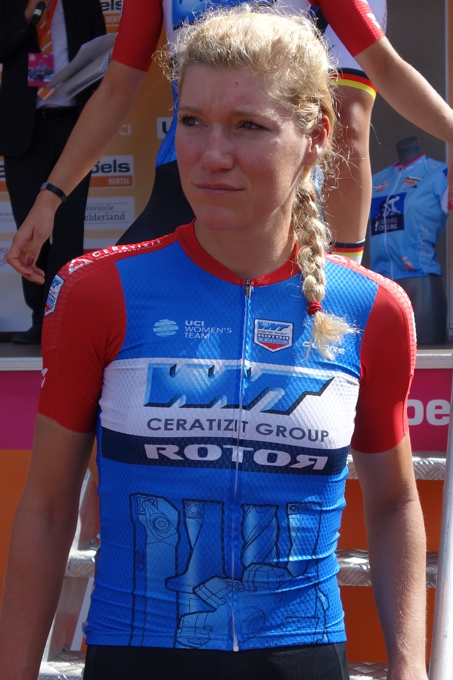 Claudia Koster (WNT-Rotor) bij de start van de eerste etappe van Stramproy naar Weert in de Boels Ladies Tour 2019